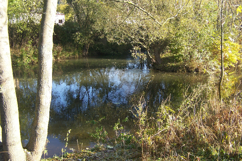 In der Ortslage Eisenach mündet die Nesse (links) in die Hörsel (von rechts).